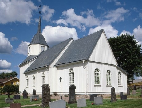 Öreryds kyrka i Gislaveds kommun